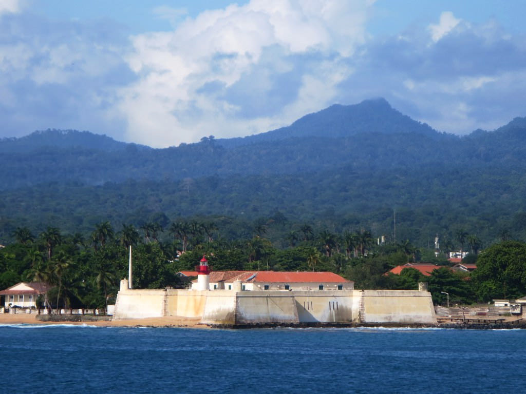 The verdant peaks of São Tomé Island provide a backdrop for the Forte de Sao Sebastiao (1575) in São Tomé town, São Tomé and Príncipe.